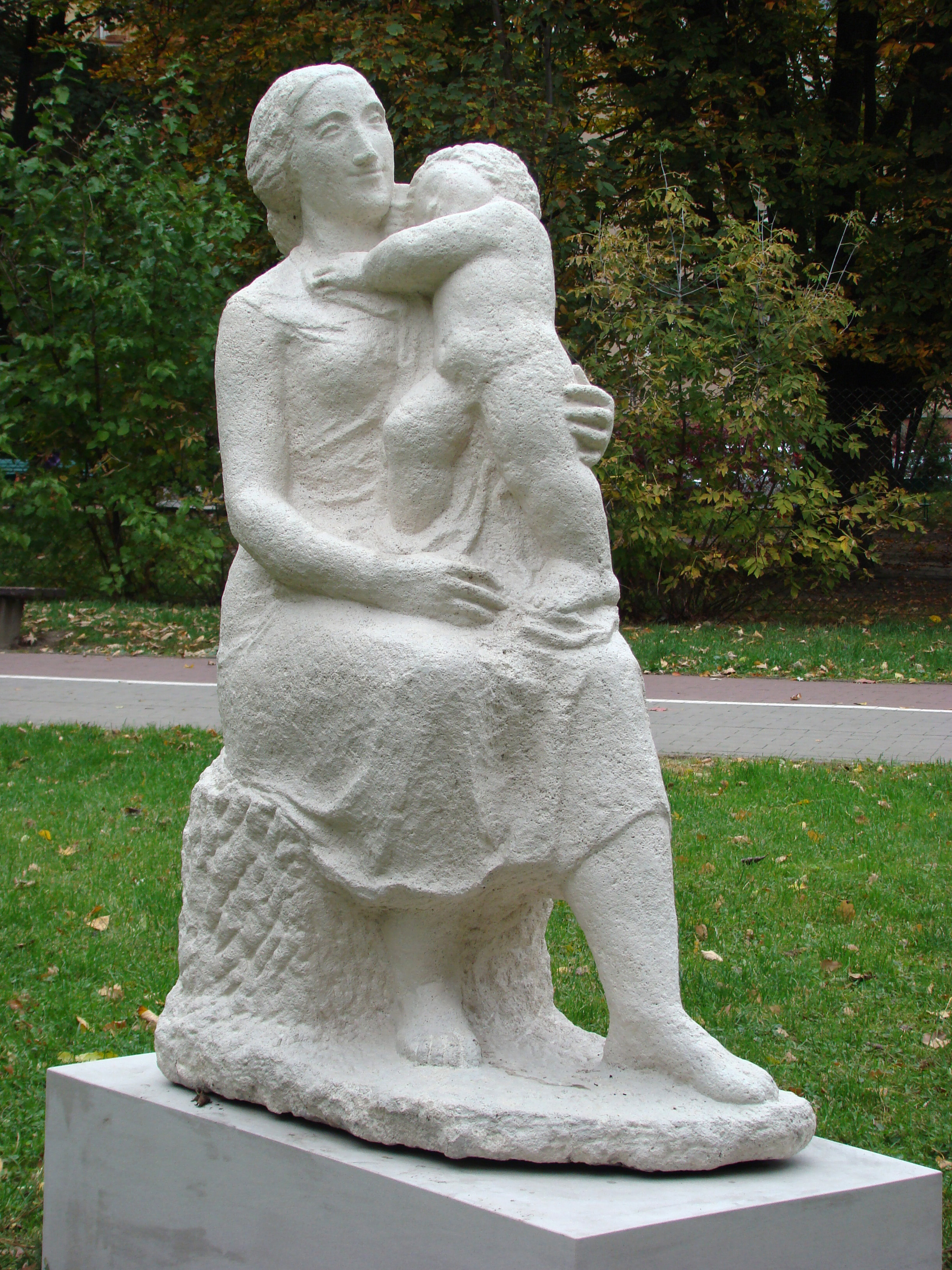 Alina Szapocznikow – Kobieta z dzieckiem – ok. 1949 – Warszawa, obok teatru Komedia